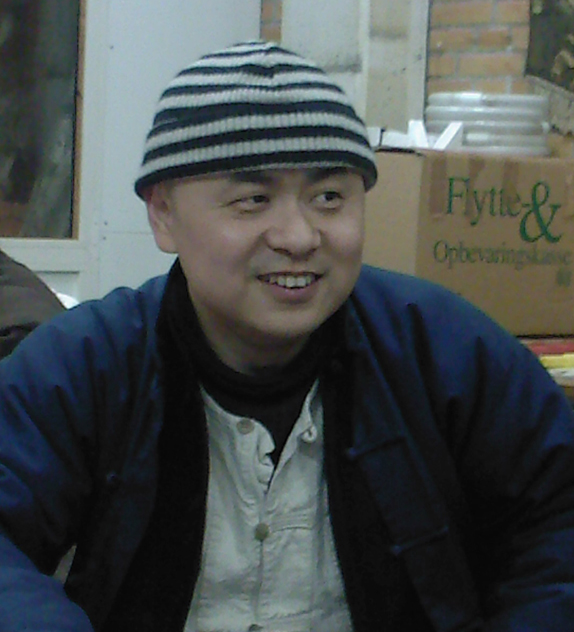 Digteren Jun Feng aka Jimbut.